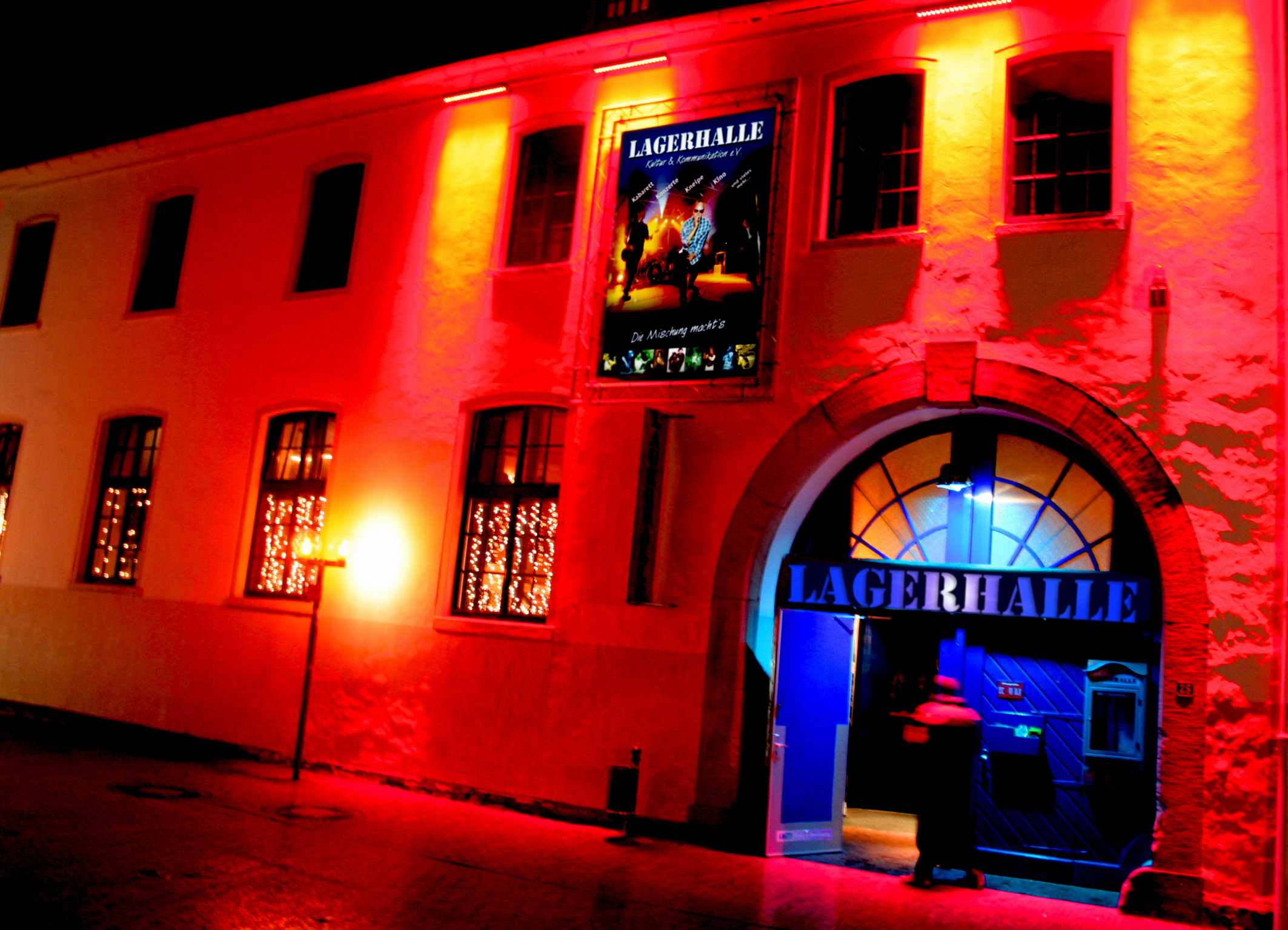 Die Frontseite der Lagerhalle bei Nacht.